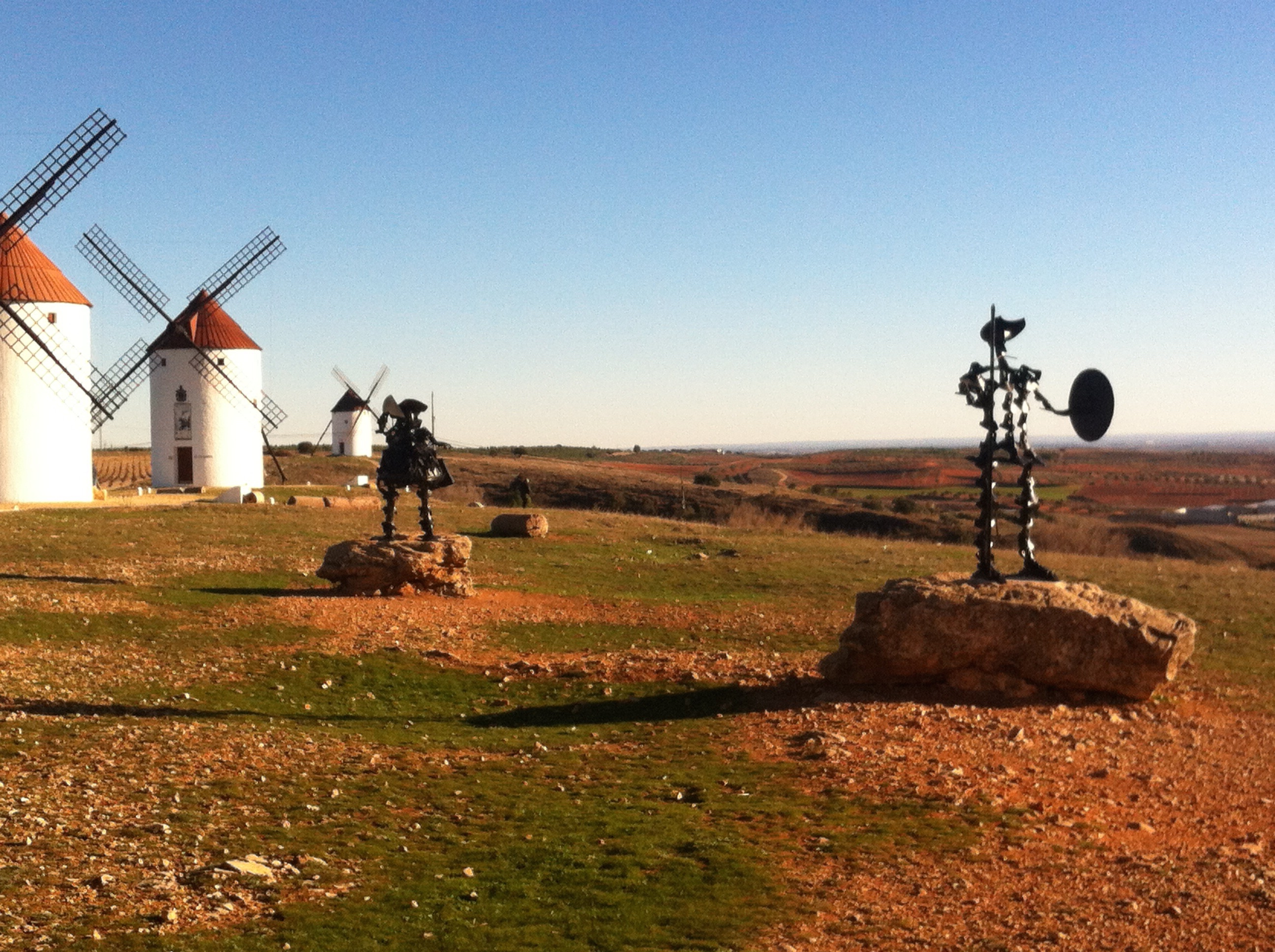 Molinos de Mota del Cuervo y figuras de Don Quijote y Sancho Panza